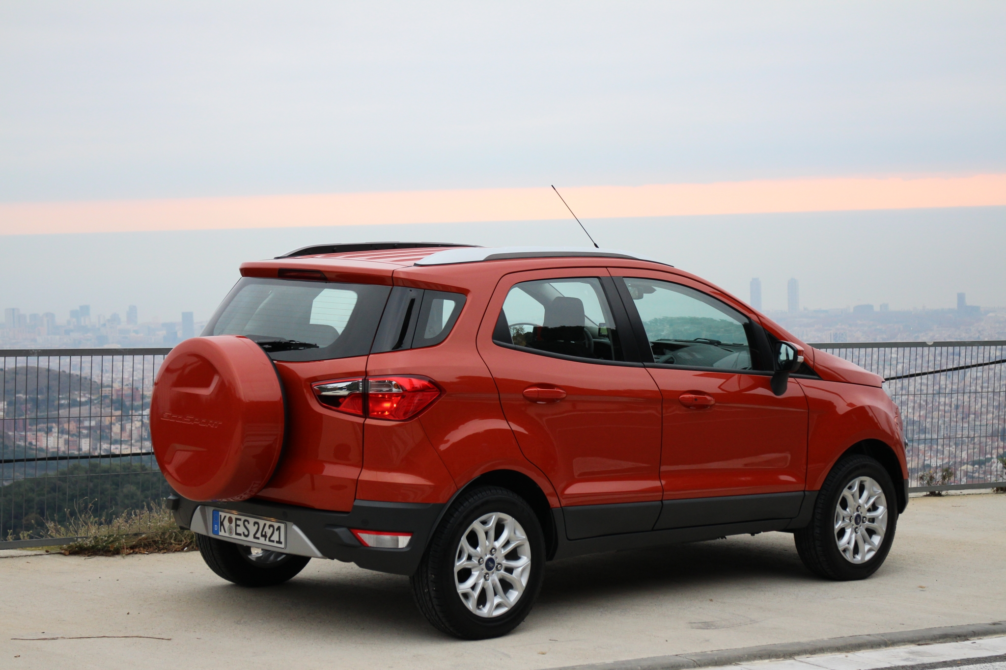 Ford EcoSport Diesel 2013